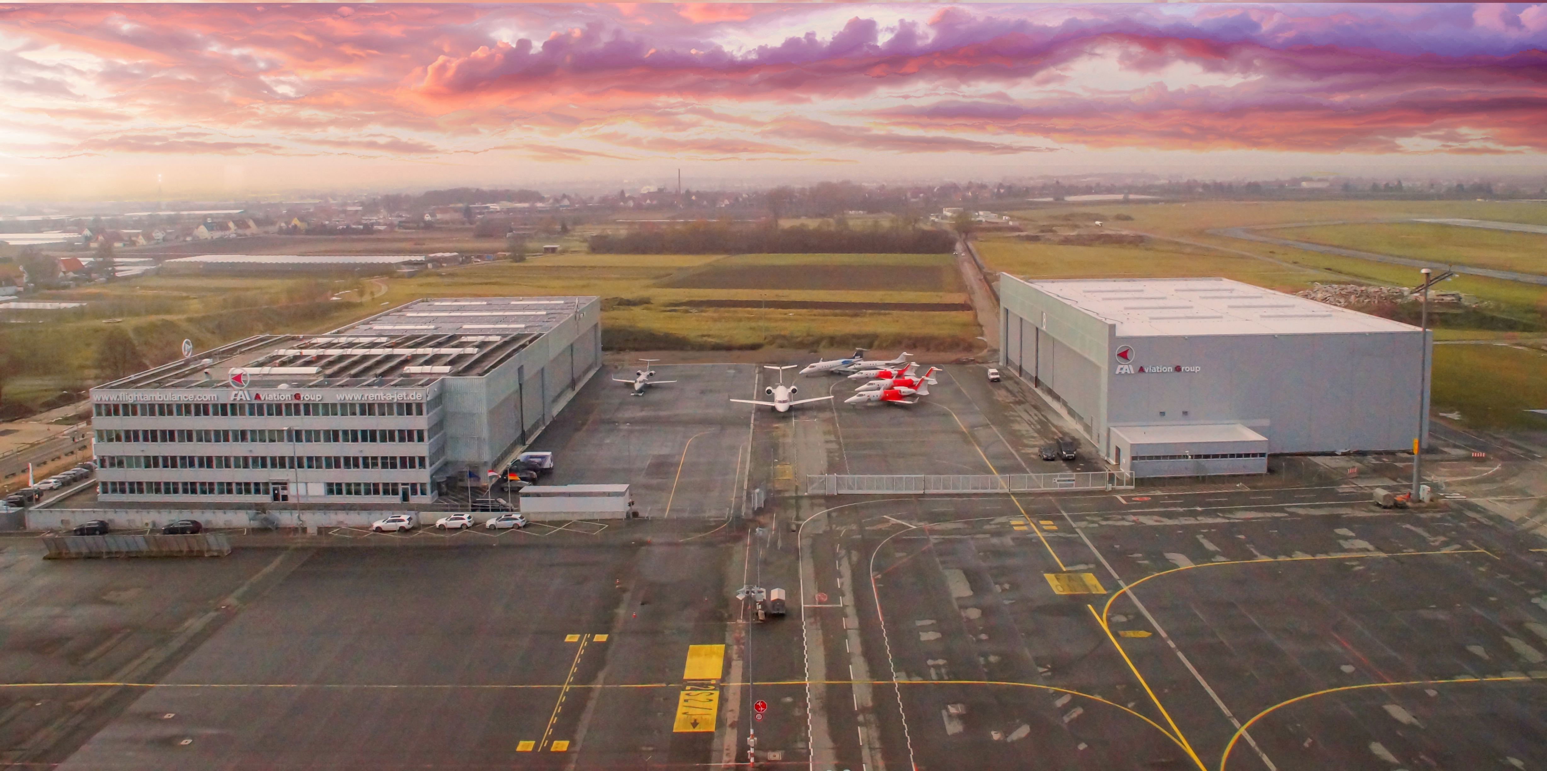 Hanger der FAI rent-a-jet